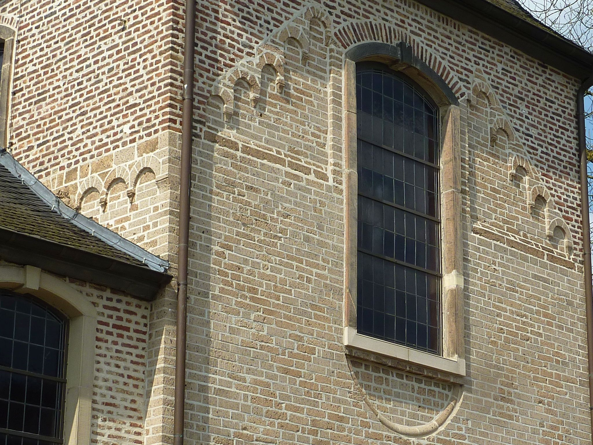 Evangelische Kirche (Wickrathberg)